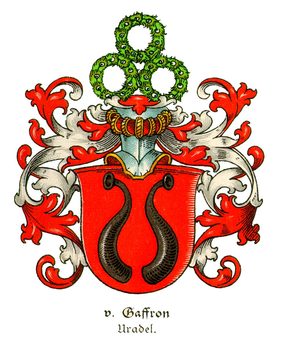 Familjevapen för von Gaffron und Oberstradam